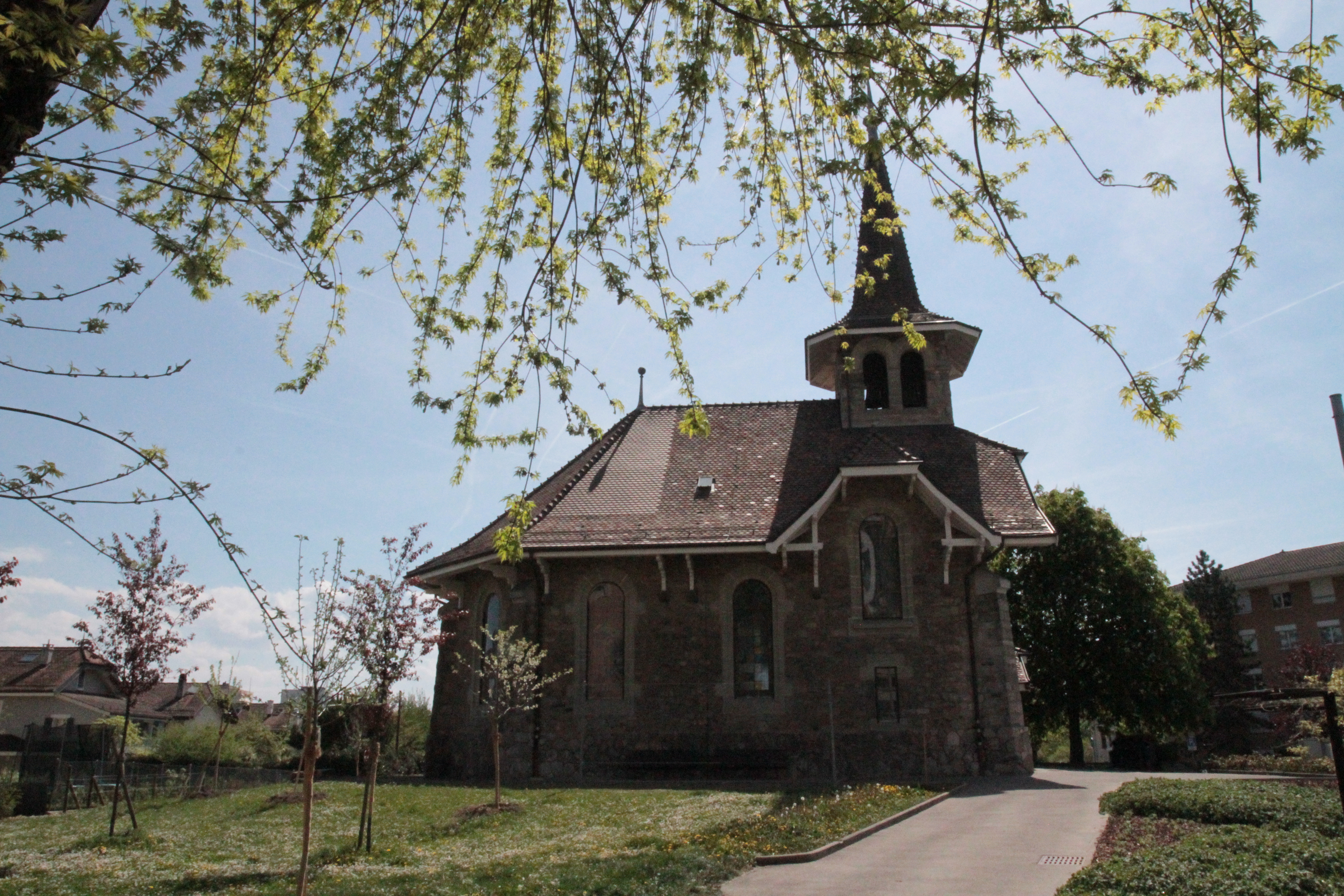 Temple protestant de Chavannes-près-Renens